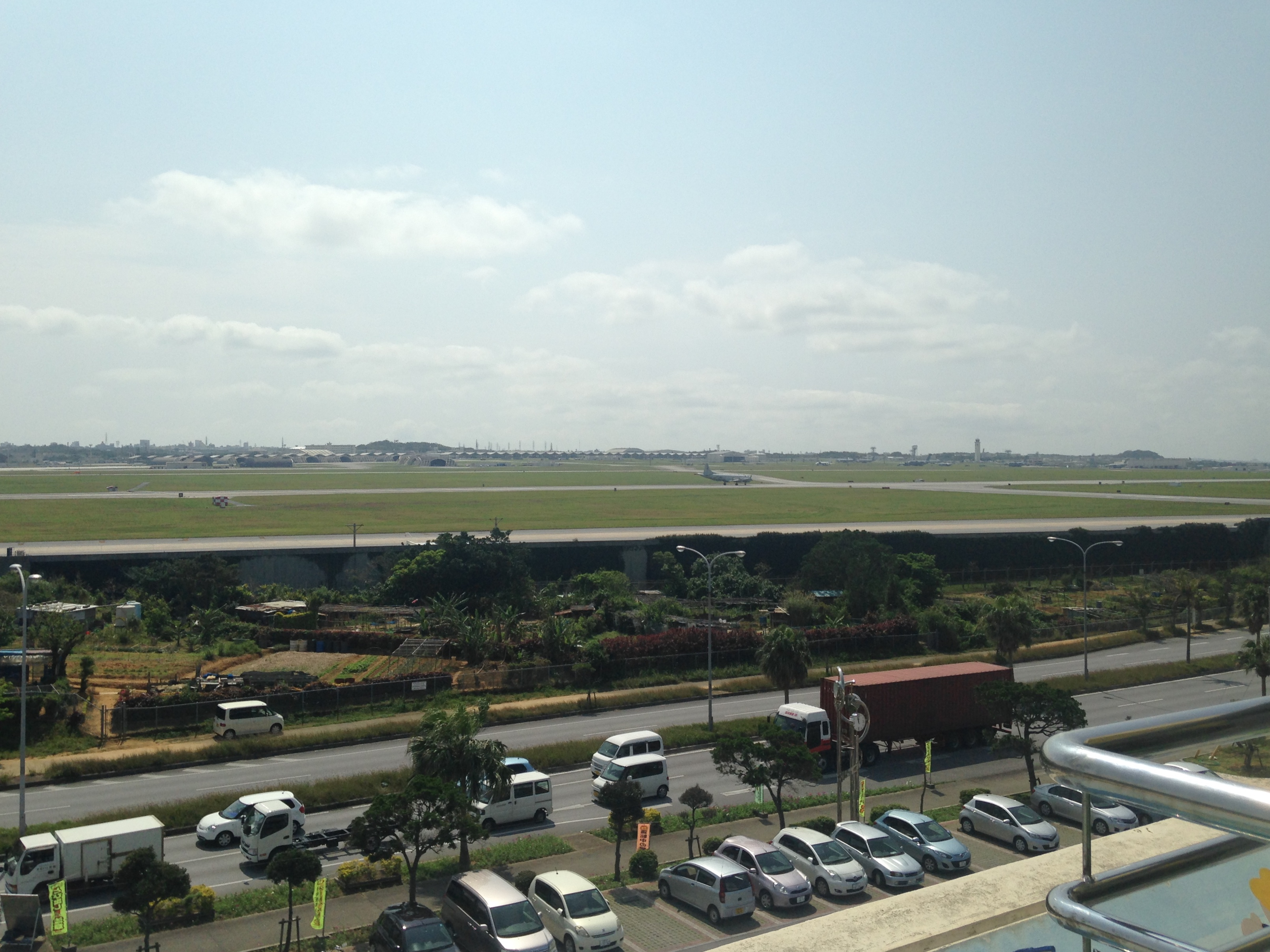 道の駅かでなの展望台より望む嘉手納飛行場